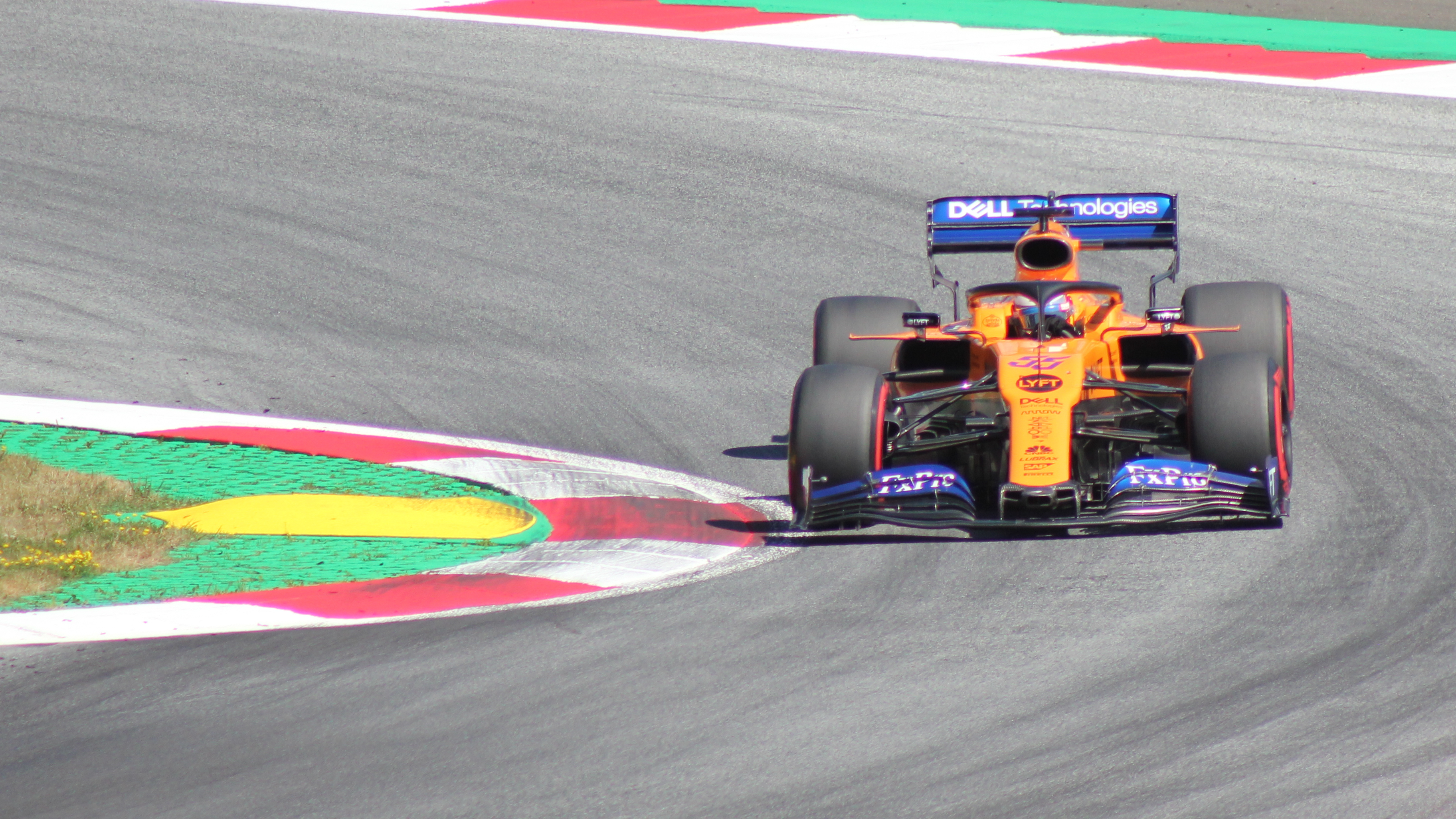 Sainz beim Rennwochenende in Österreich 2019